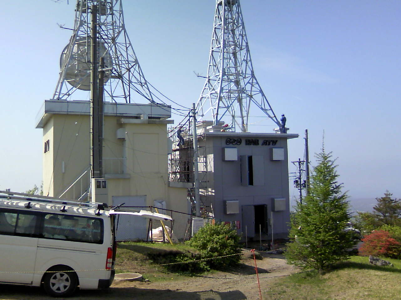 建設中の「八戸デジタルテレビ放送中継所（NHK青森、RAB、ATV）」（右）とATVアナログ放送中継所（左）（青森県階上岳） (NHK Hachinohe Area Broadcast Relay Place - Hashikamidake, Aomori, JAPAN)